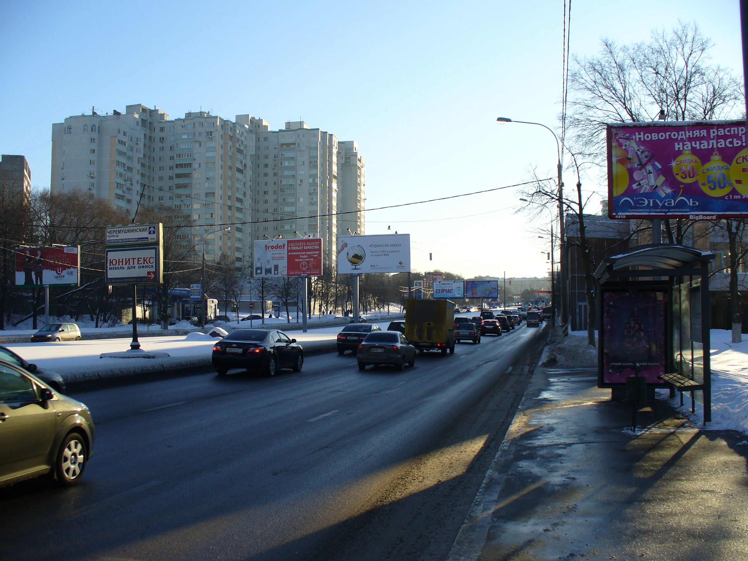 Проспект 60-летия Октября. Вид 2 Вид со стороны центра на Проспект 60-летия Октября Россия, Москва, Юго-Западный административный округ, Академический район